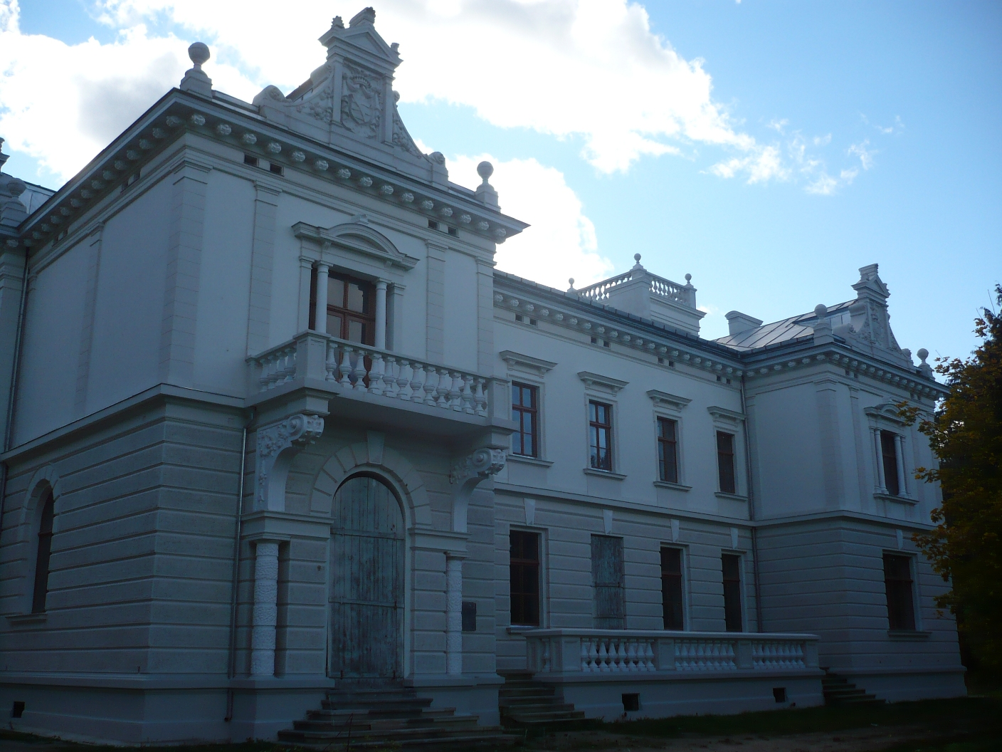 Vilkėno dvaras